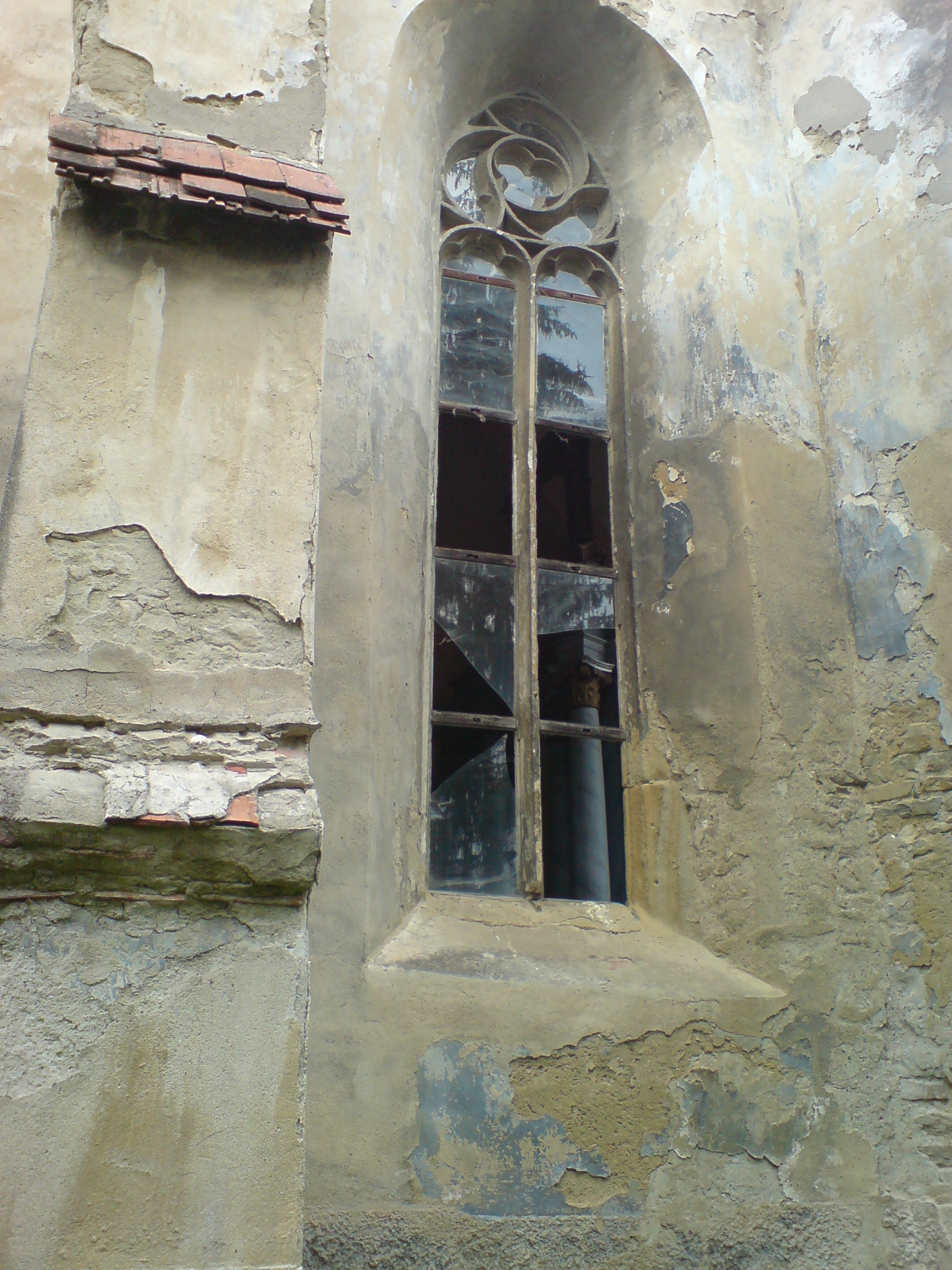 Kirchenburg Mardisch (Moardăş, Sibiu) Chorfenster (2008)